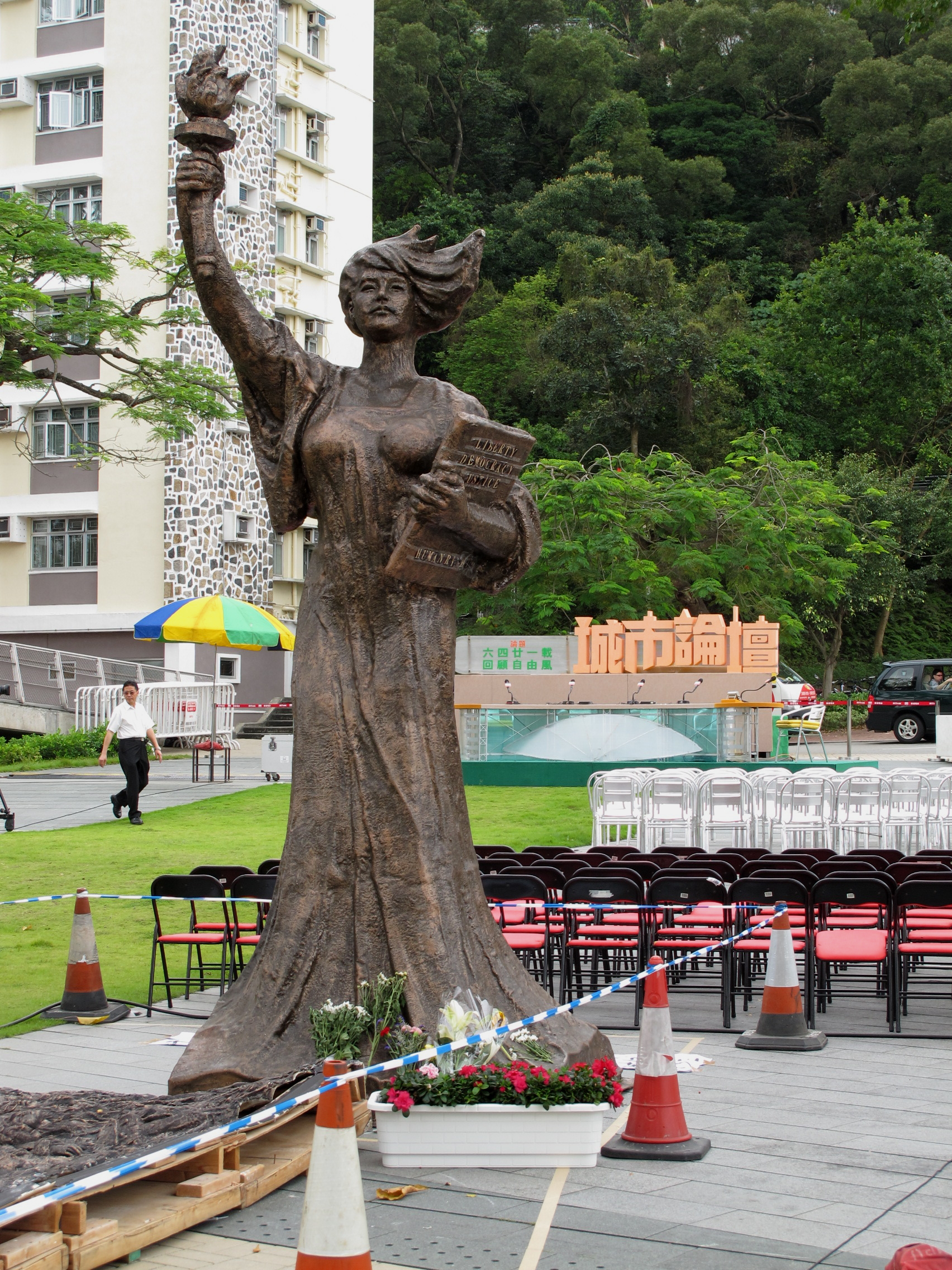 城市論壇於香港中文大學的直播